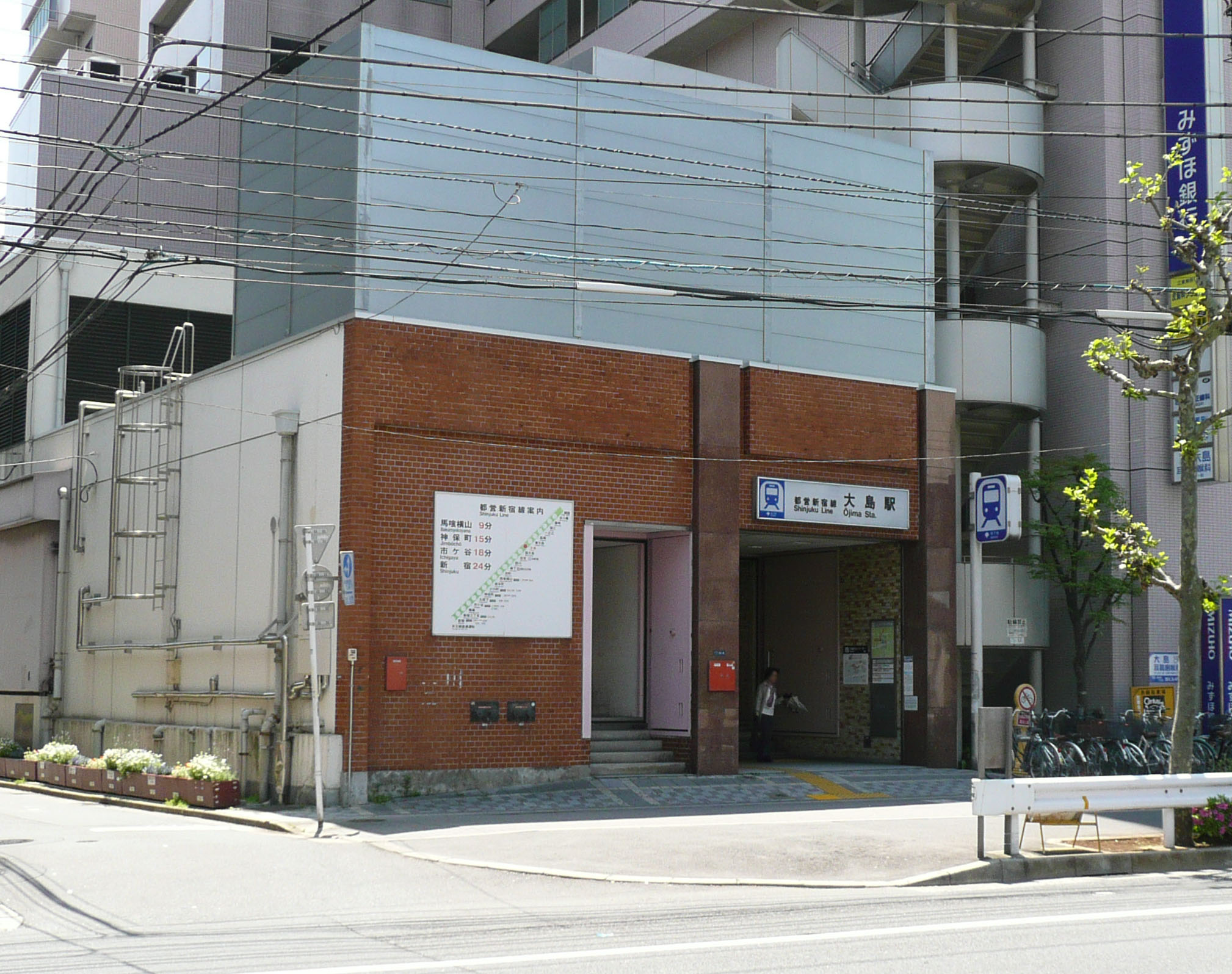 大島駅A1出入口